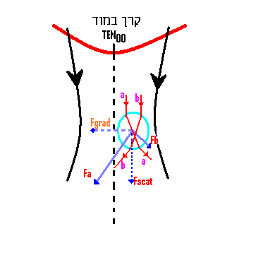 תרשים 3: בתרשים זה רואים חזית התקדמות של קרן לייזר במוד TEM00 כאשר כתוצאה מאור הלייזר הפוגע בכדור המוסט ממיקומו לעומת מרכז הקרן מופעלים הכוחות Fa וFb, אשר נובעים משבירת הקרניים a ו-b, מהות הכוחות ומקורם Fgrad ו- Fscat מוסברים בהמשך.